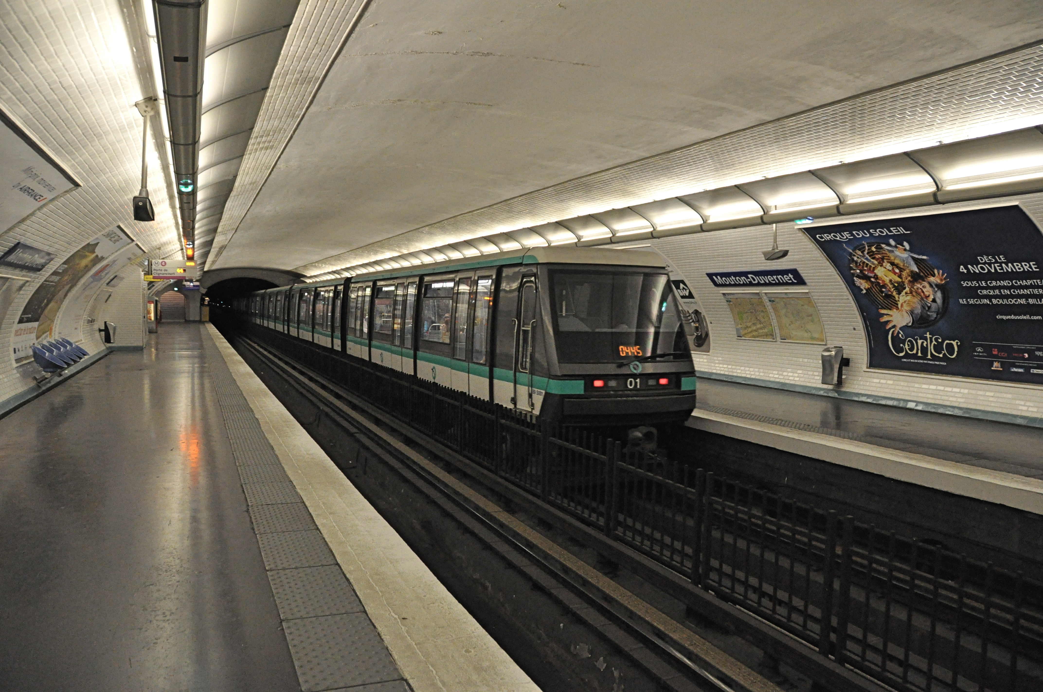 Le MP 89 CC 01 sur la ligne 4 du métro de Paris.